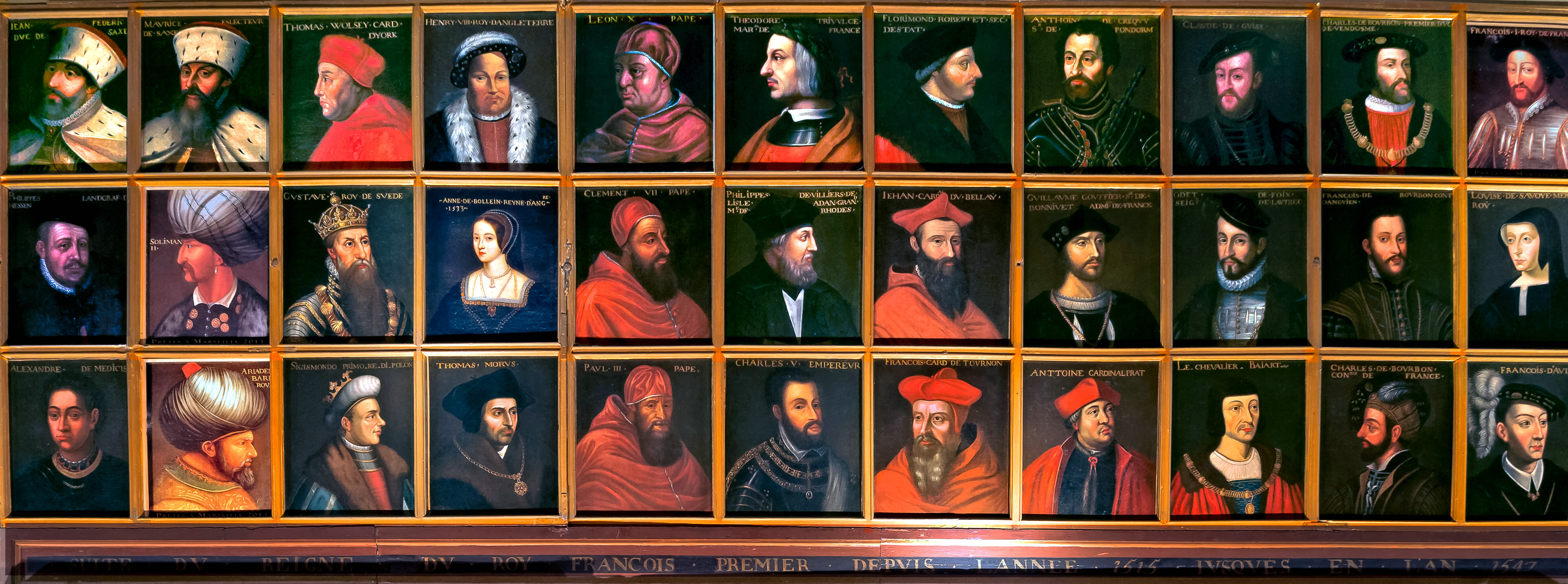 Schloss Beauregard, Gemäldegalerie bedeutender Persönlichkeiten aus dem Zeitalter des französischen Königs Franz I.